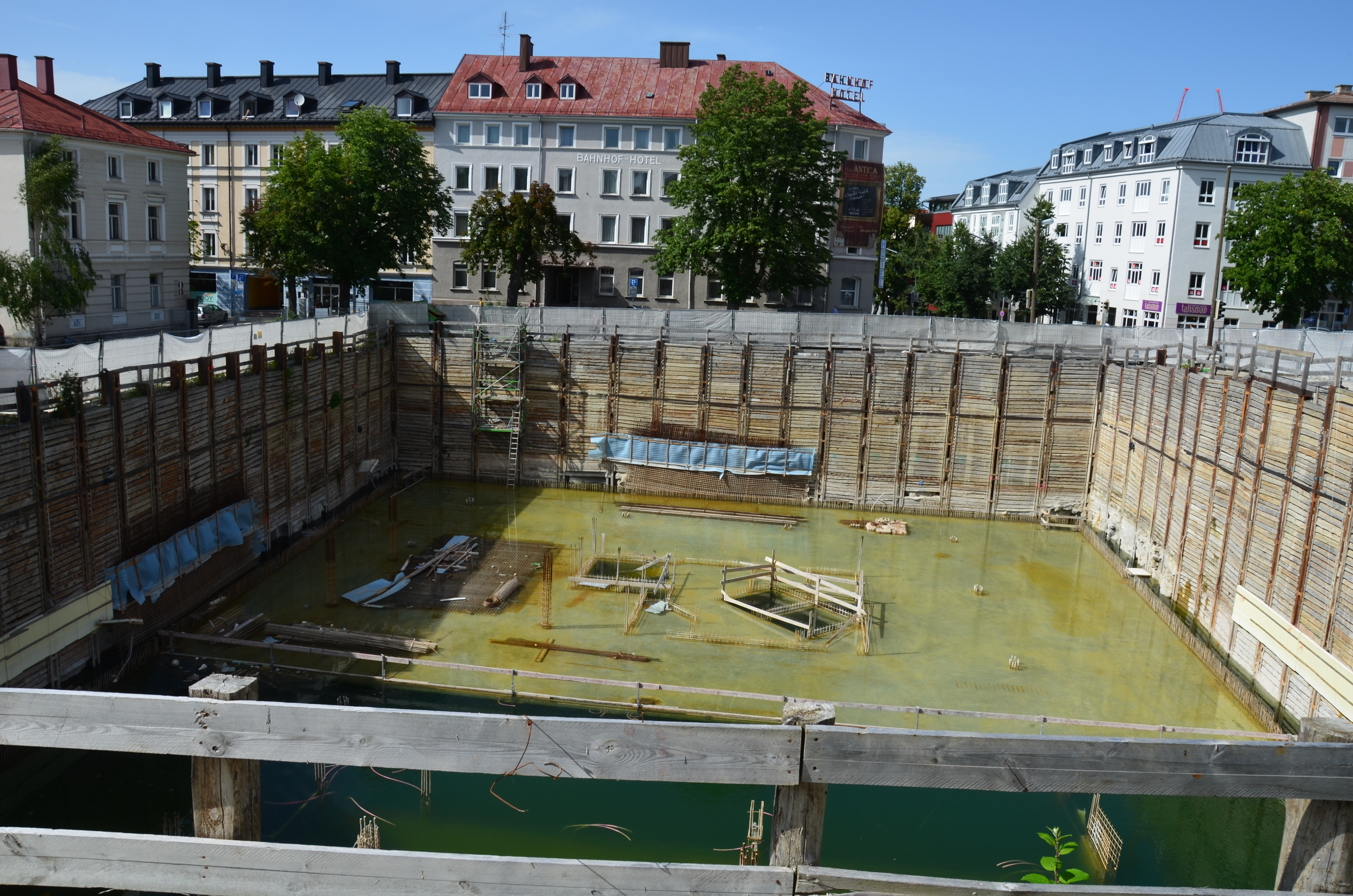 August-Fischer-Loch